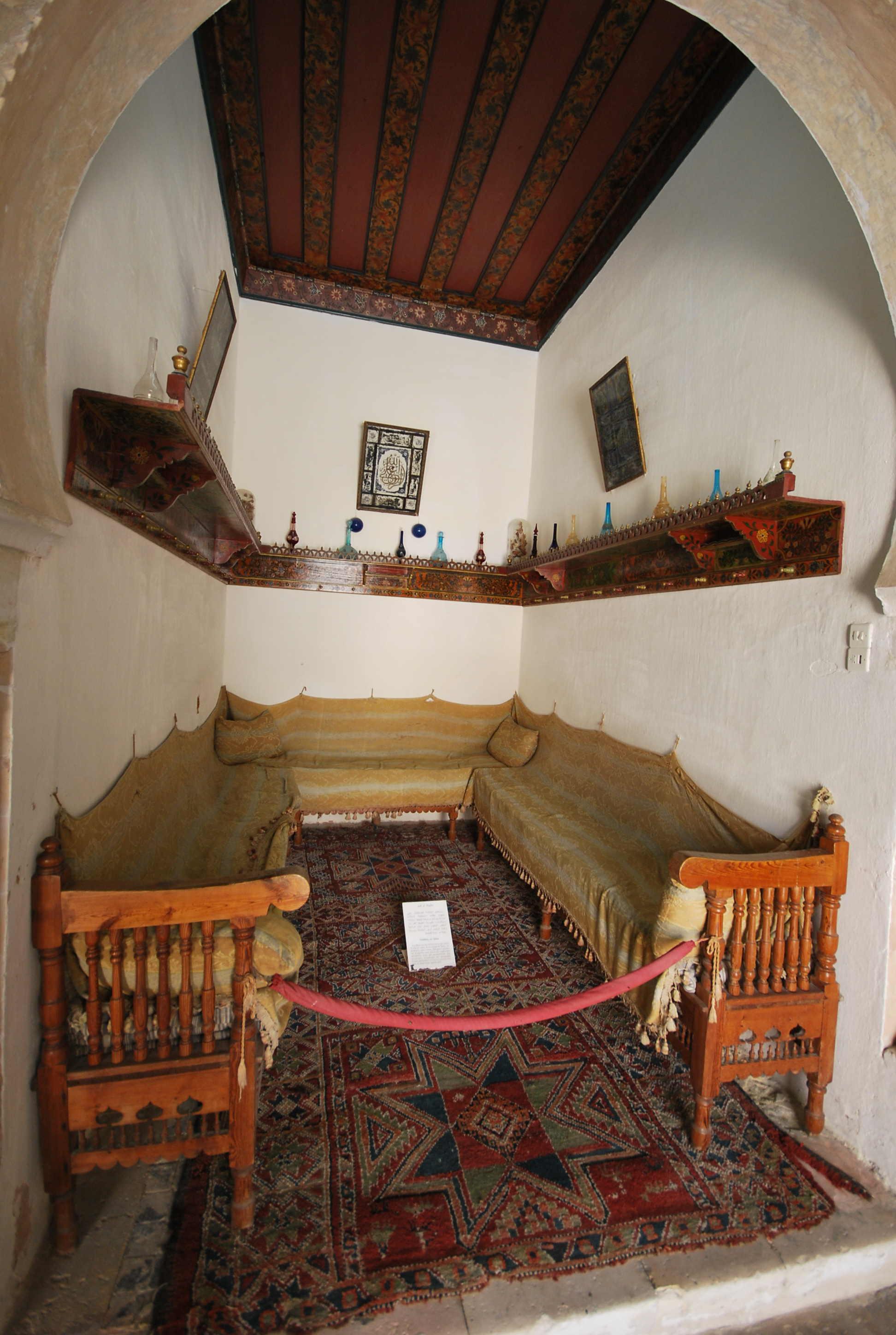 Pièce reconstituée au musée Dar Jallouli à Sfax